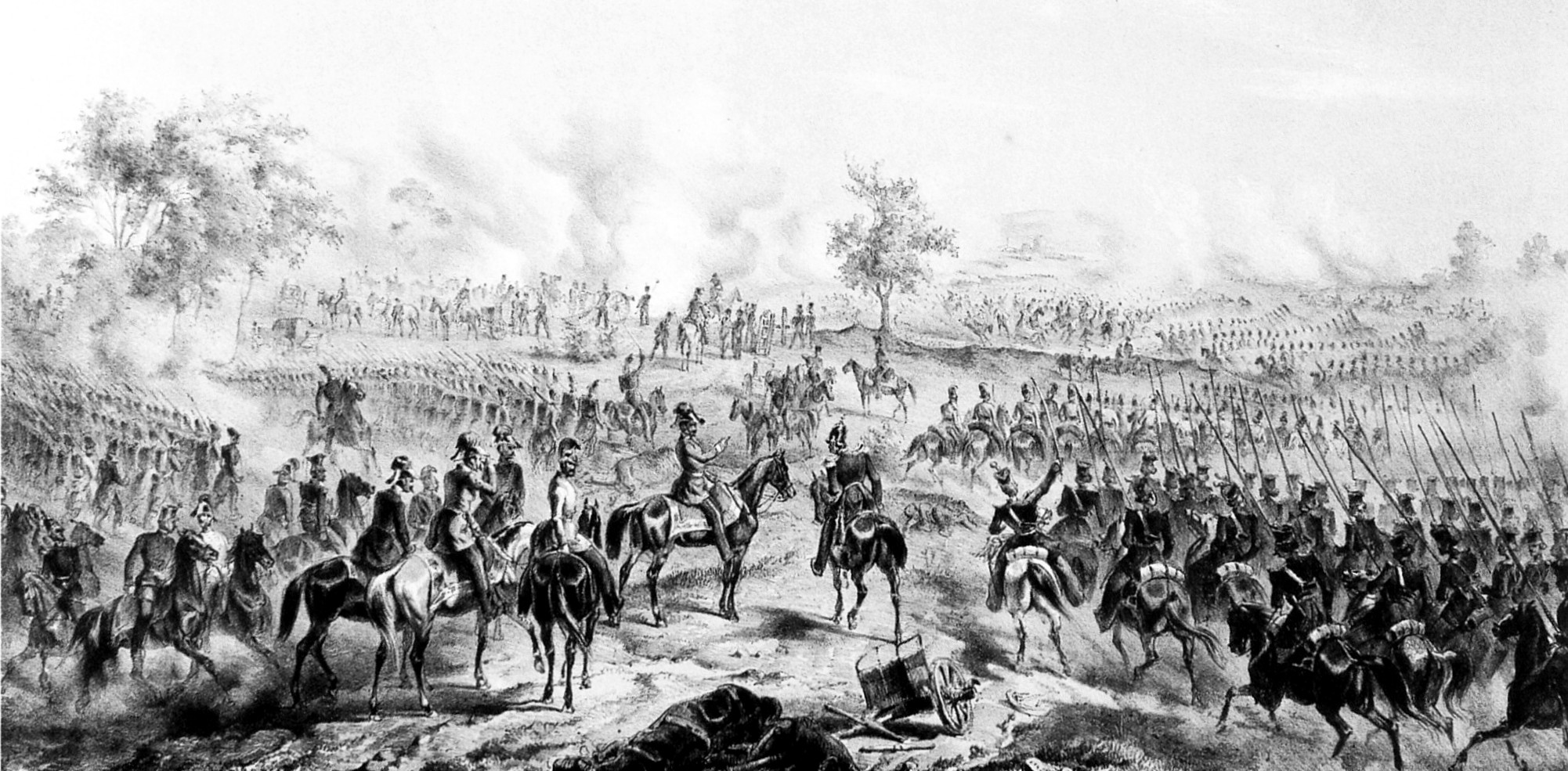 Az orosz Panyutyin-hadosztály (Fjodor Szergejevics Panyutyin altábornagy, 1790-1865) a peredi csata második napján, 1849. június 21-én. B. Bachmann-Hochmann litográfiája